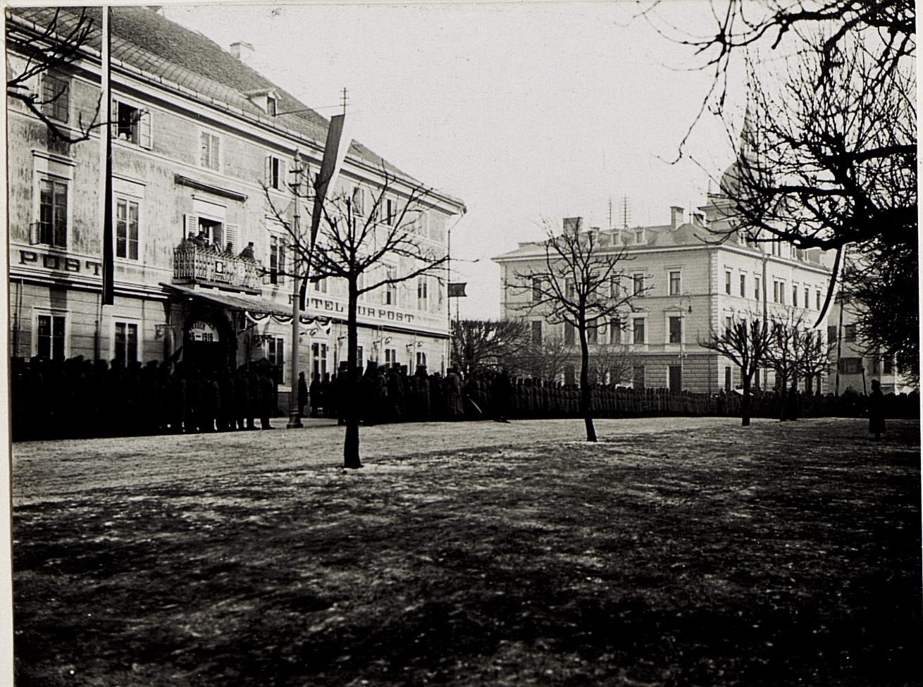 Bruneck, Kaiserjägerfeier am 16.1.1916. Roth geht die Front der aufgestellten Baone ab.